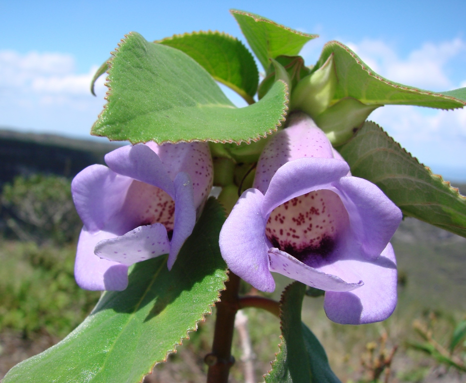 Paliavana tenuiflora - GESNERIACEAE Parque Nacional da Chapada Diamantina - Palmeiras - Bahia - Brasil.